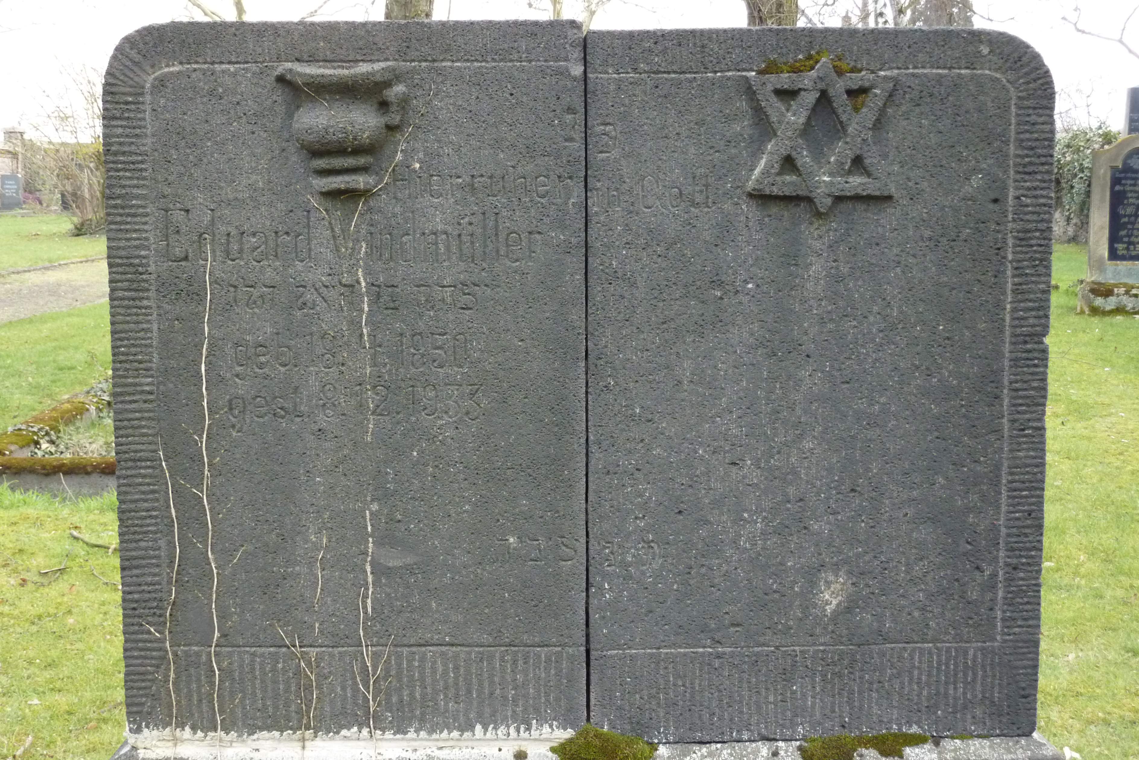 Jüdischer Friedhof Andernach, Koblenzer Straße beim städtischen Friedhof